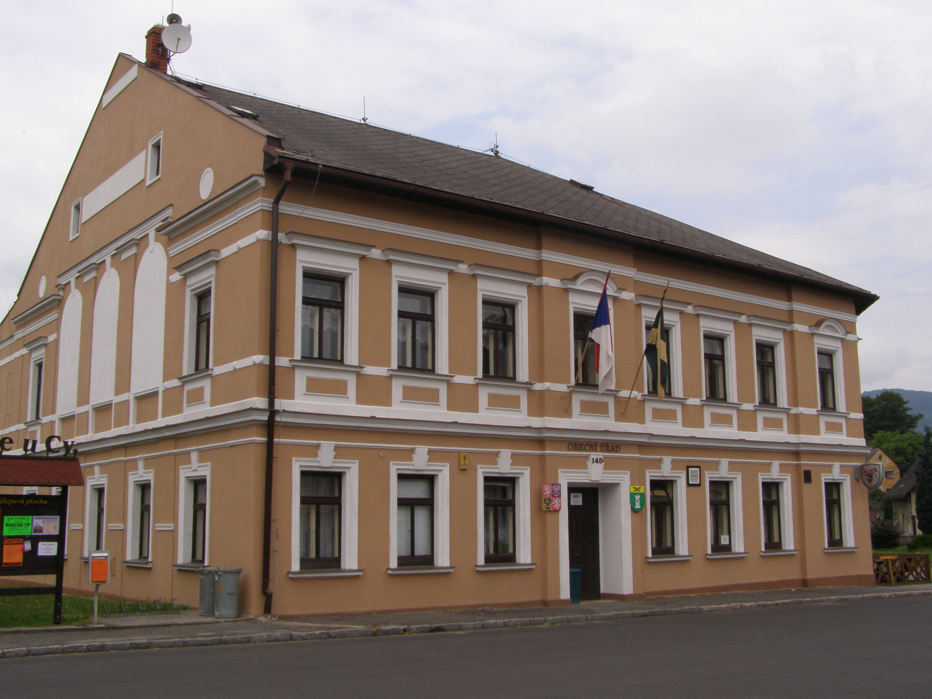 Česky: Kunratice u Cvikova, obecní úřad